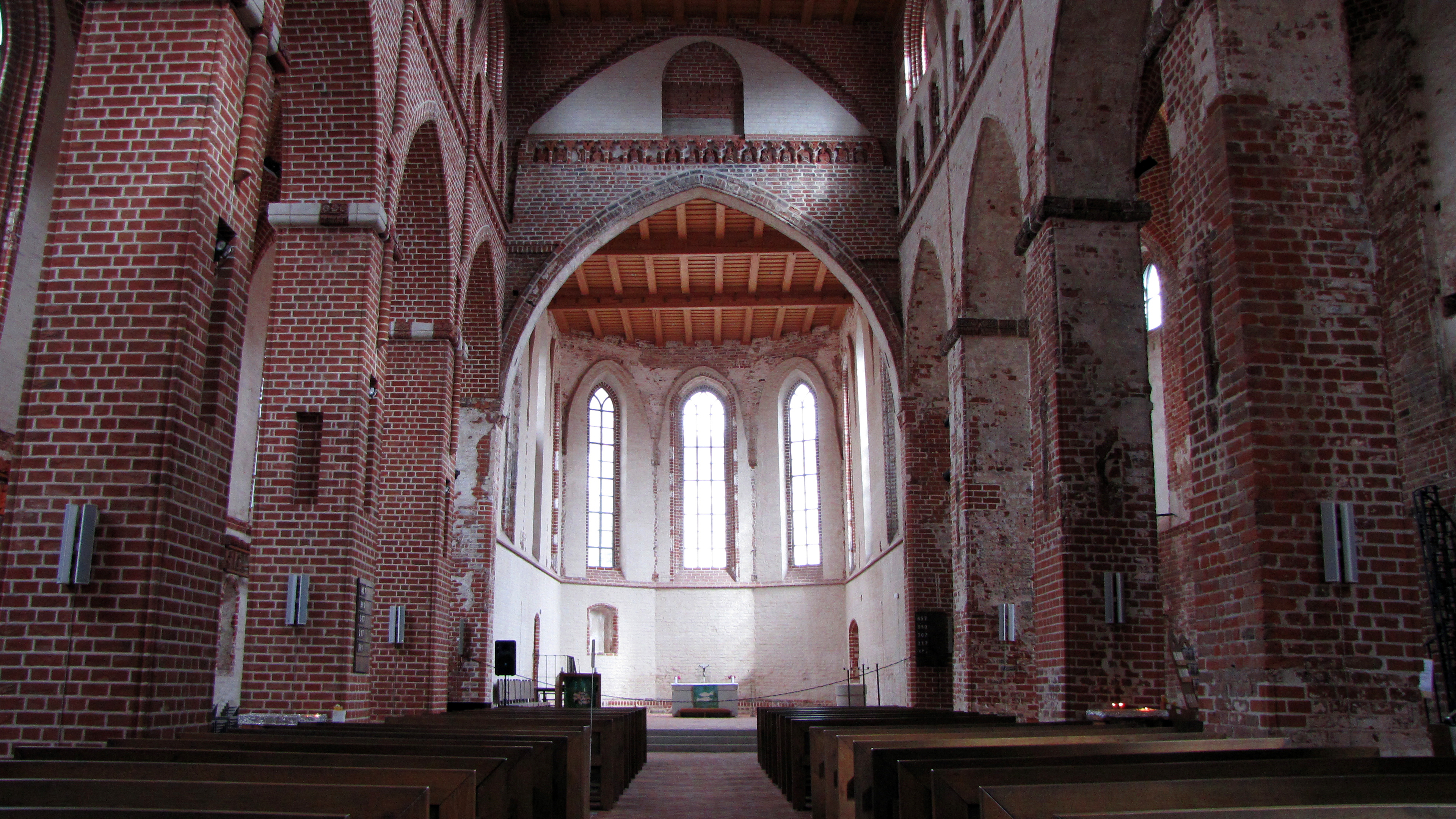 Tartu Jaani kirik 14. saj.